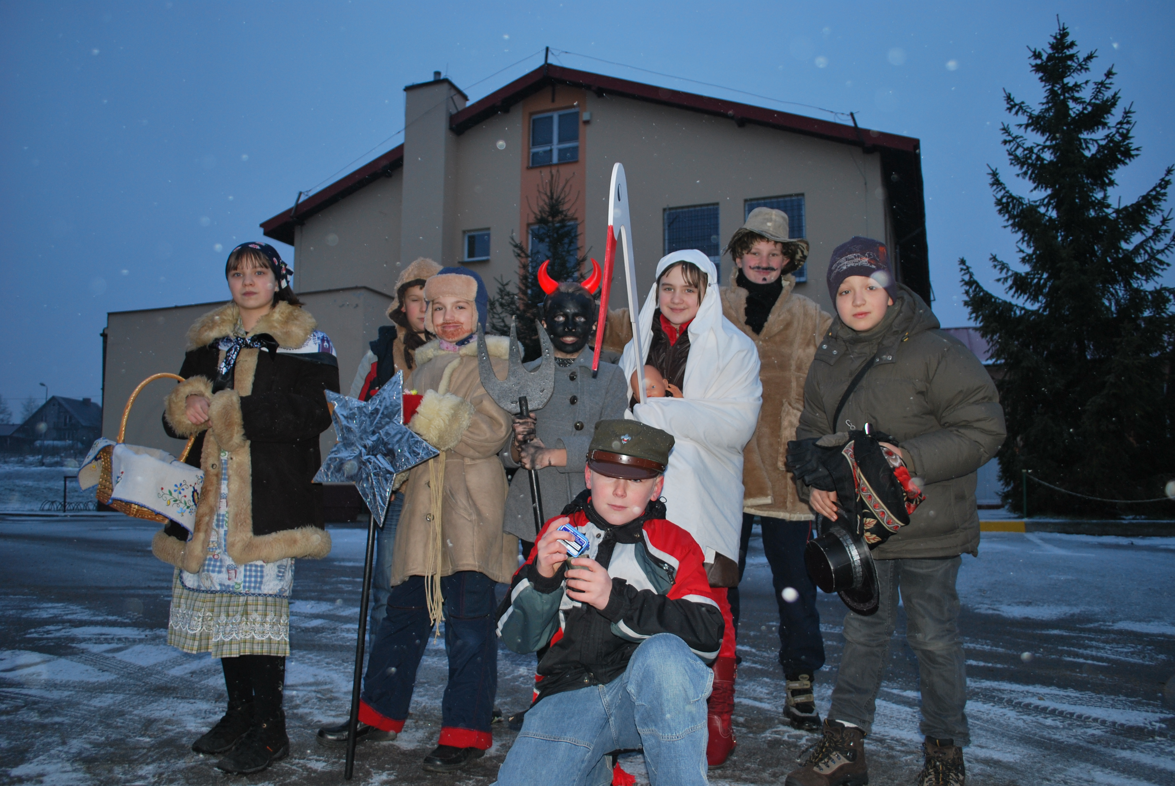 gwiżdże, gwiazdka, kolędnicy